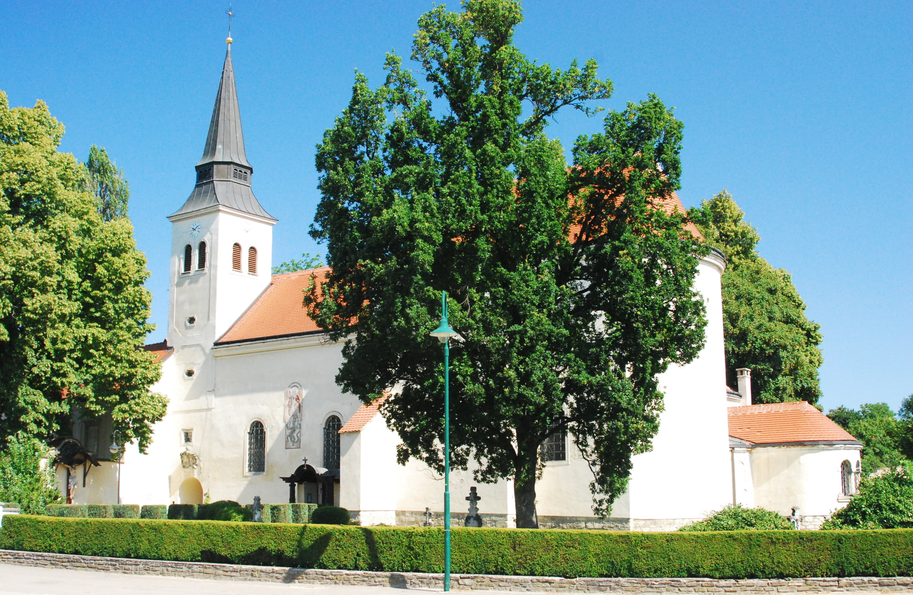 Kirche von Reinprechtspölla in Niederösterreich